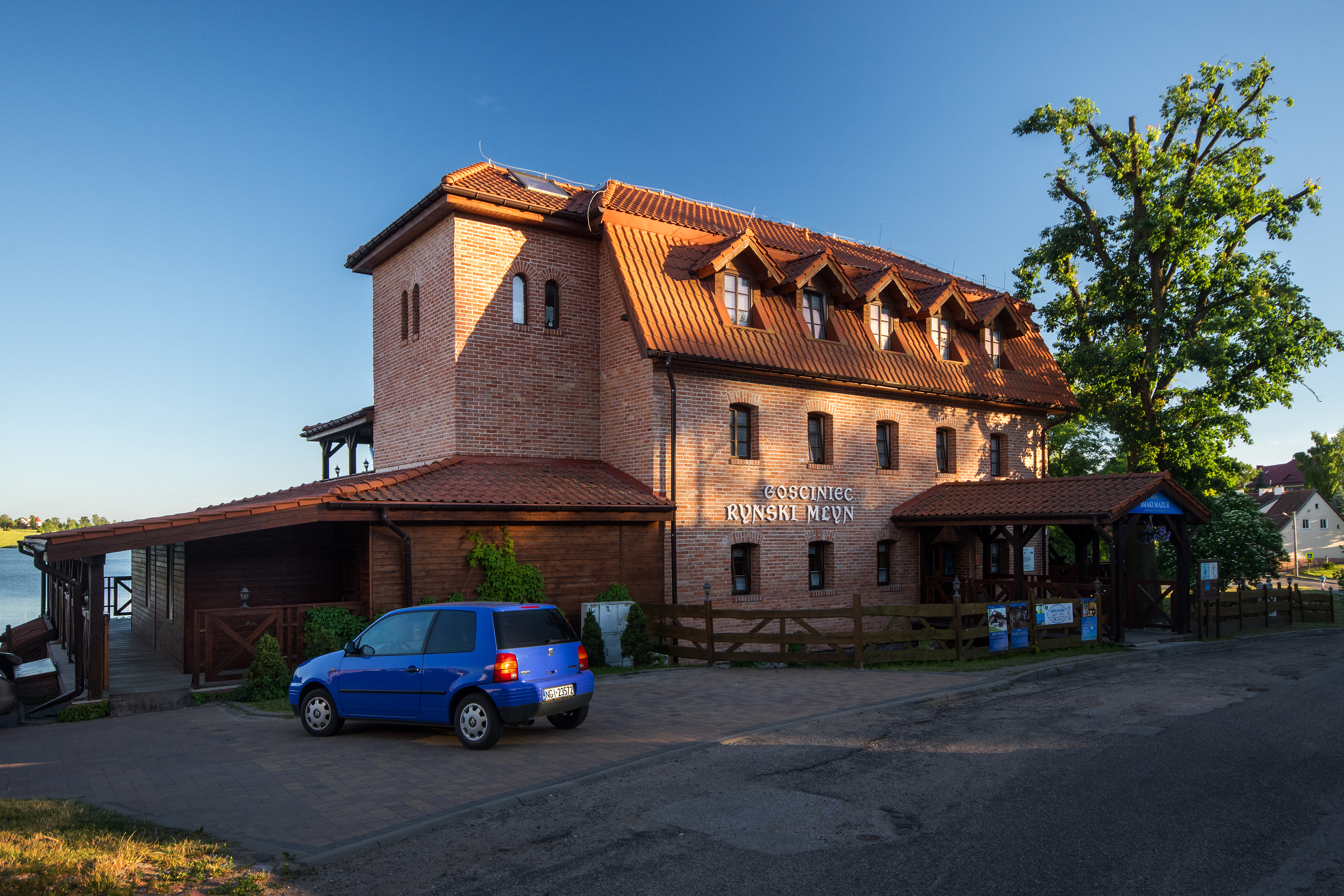 Ryn, młyn wodny, ob. elektryczny, 2 poł. XIX Wikidata has entry 645629 with data related to this item.